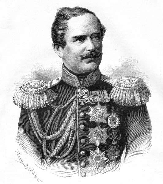 Долгоруков, Владимир Андреевич